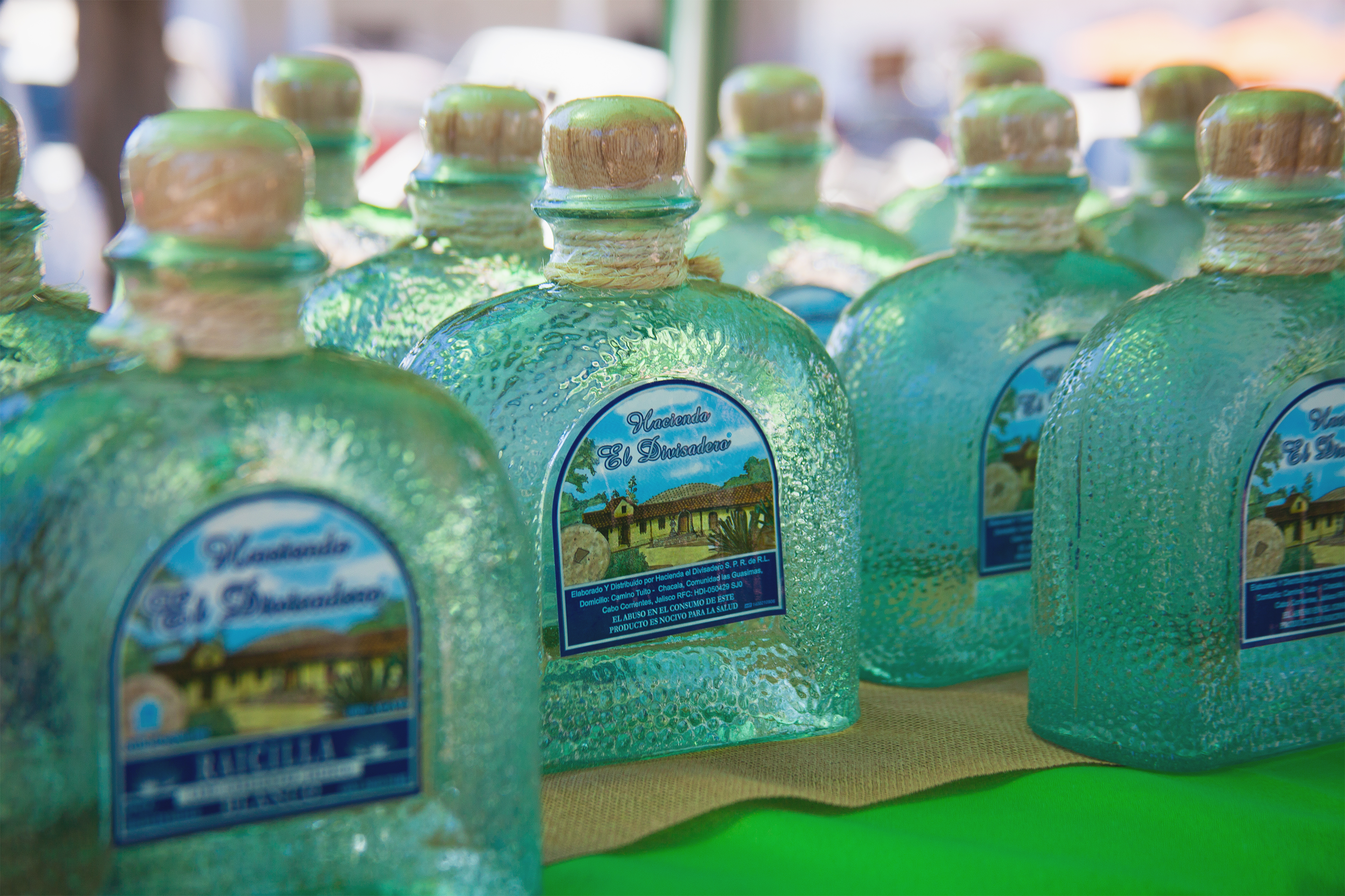 Botellas de raicilla a la venta en el Festival de la Raicilla 2013, en San Sebastian del Oeste. Donado por Daniel Alvarez